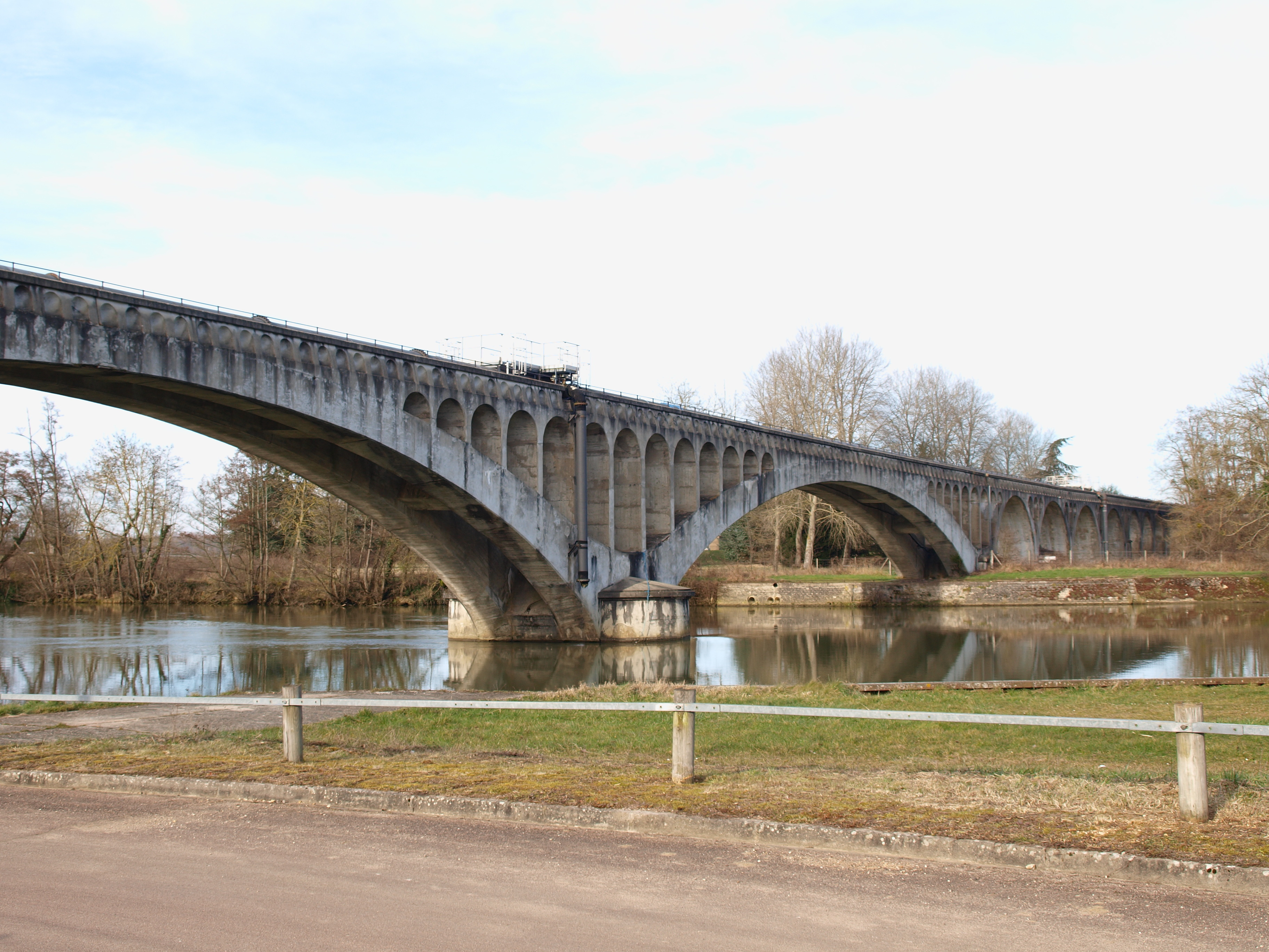 Villeperrot (Yonne, France) ; quartier de L'Isle (ce quartier se trouve entre la voie ferroviaire et la rivière Yonne)